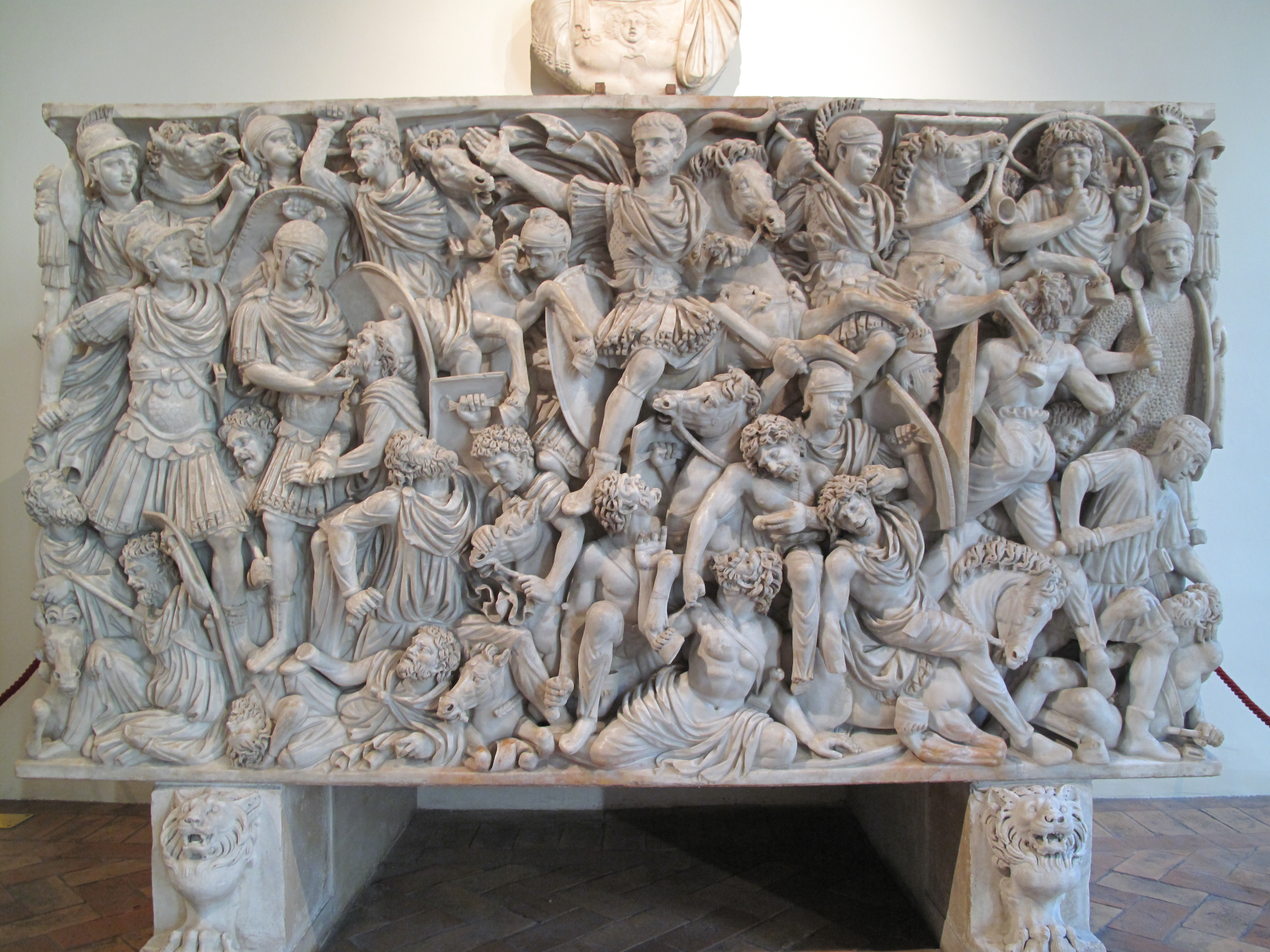 Sarcophage de la collection Ludovisi, conservé au Palazzo Altemps à Rome. Daté de la moitié du IIIe siècle p.C.